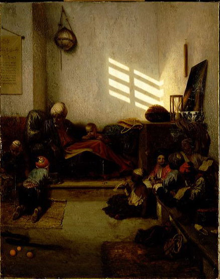 schilderij; genre; Turkije